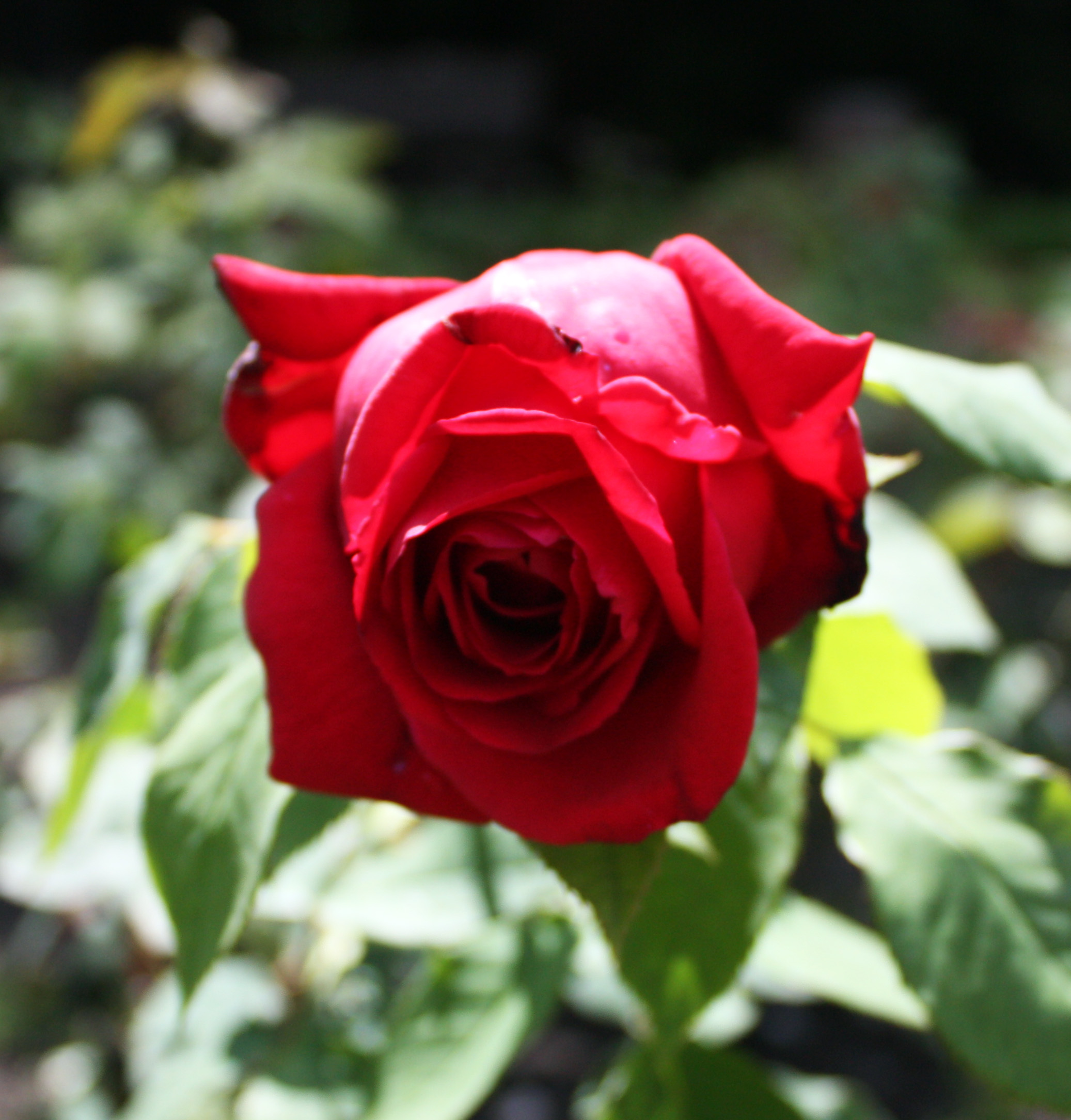 Edel-Rose (Konrad Adenauer). Rosenzüchter: Rosen Tantau, 1953.